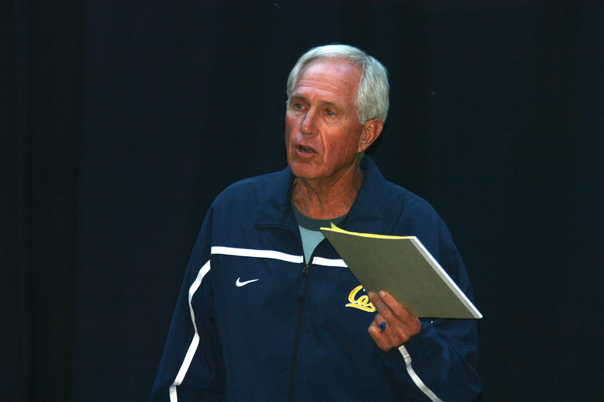 Mike White